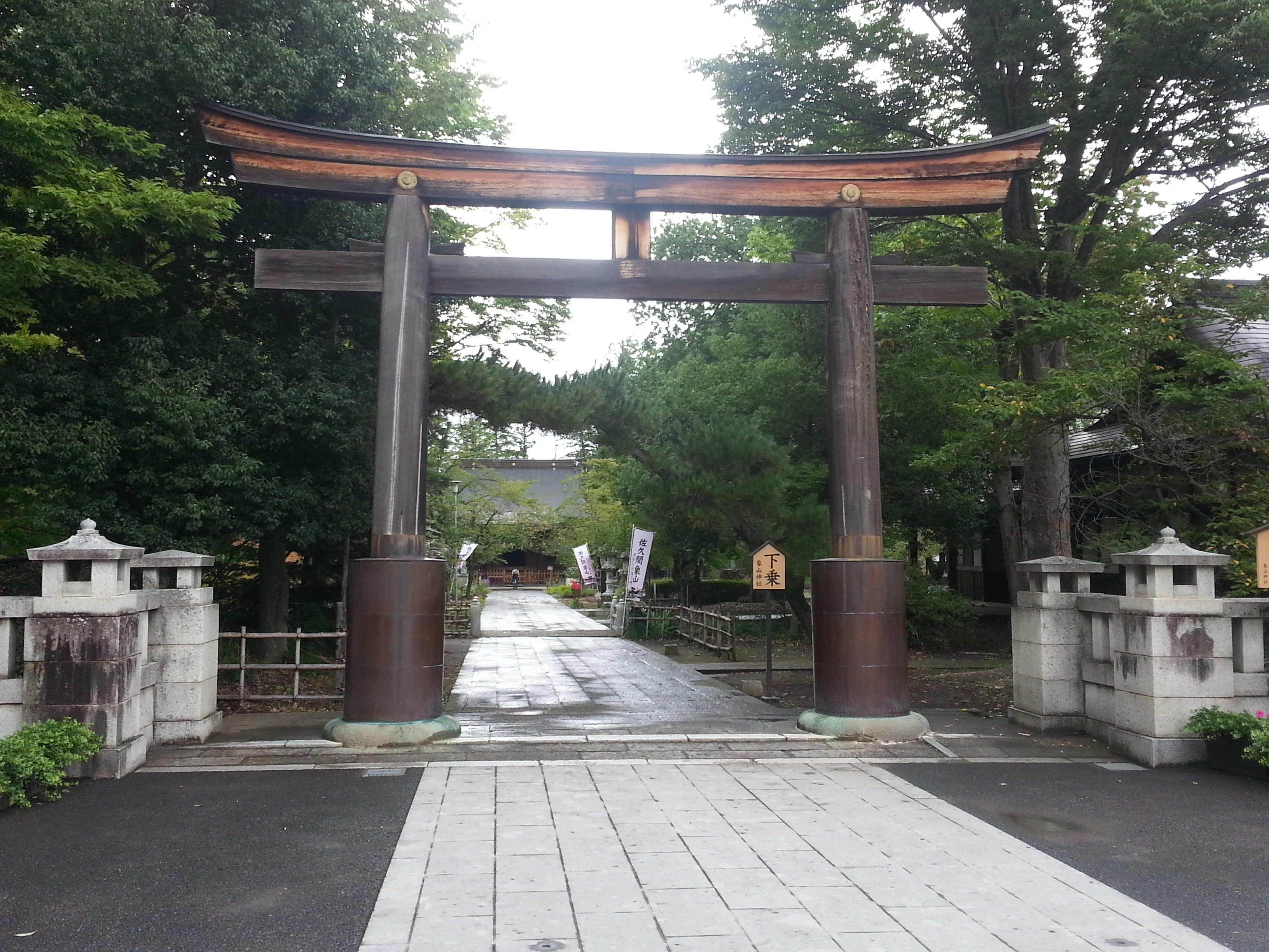 松代にある象山神社の鳥居。